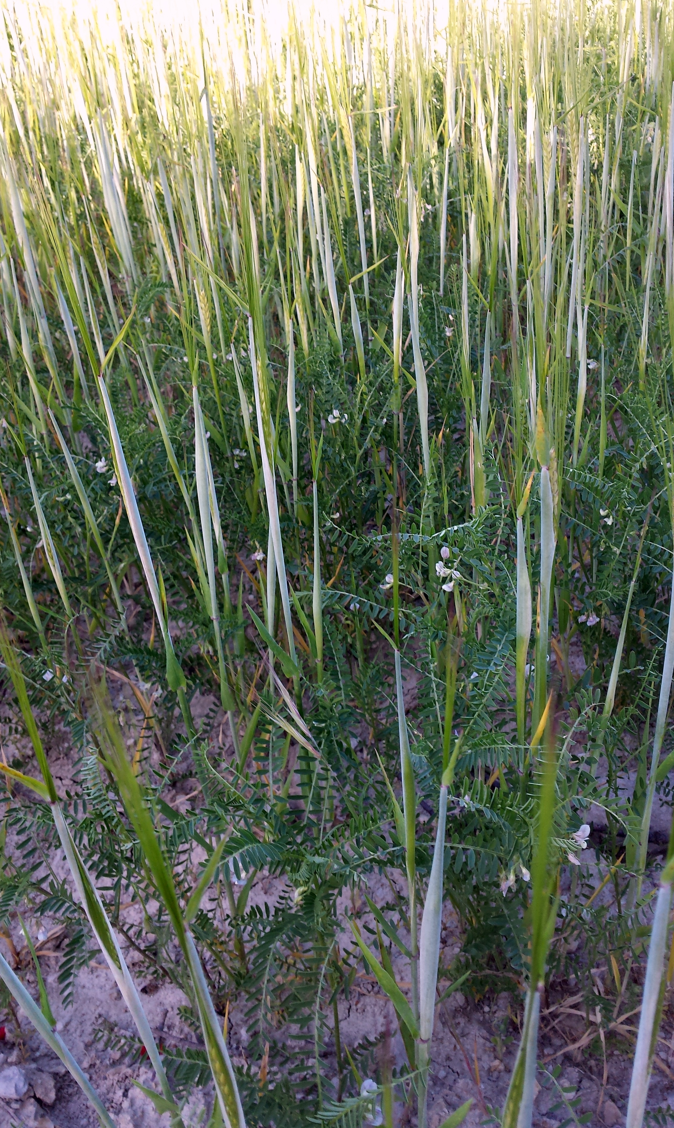 Conreu de veces amb ordi com a tutor